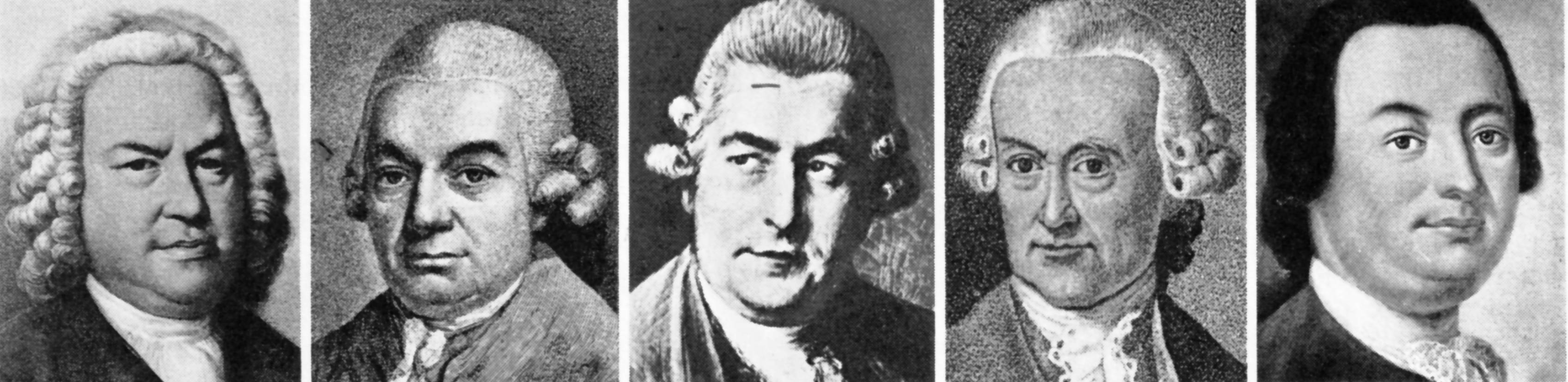 Vater Johann Sebastian Bach und seine Söhne Philipp Emanuel, Johann Christian, Friedemann, Johann Christoph d.J.